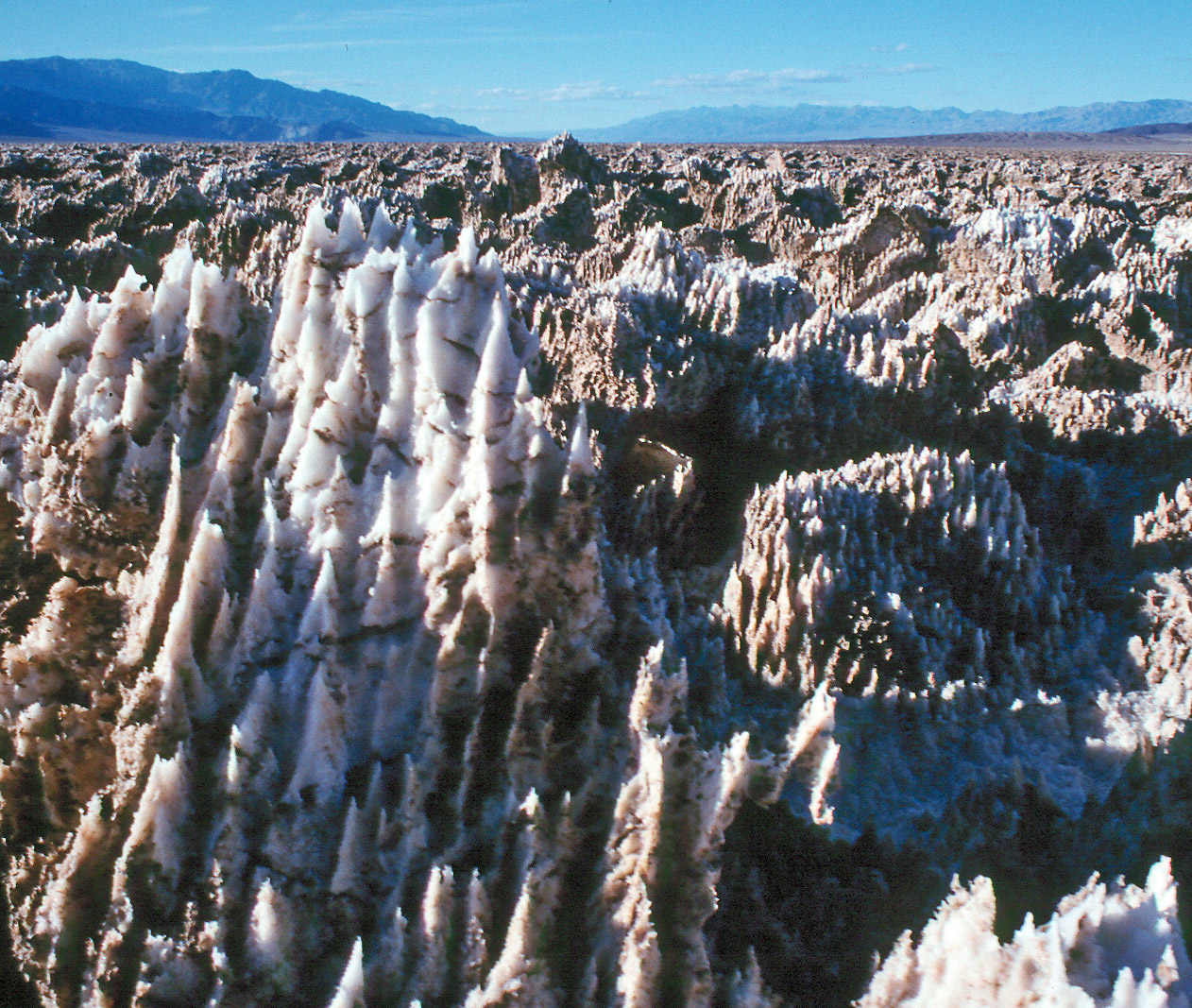 Salzstrukturen am "Devil's Golf Course" im Death Valley (USA).